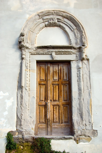 Wikipedia: [ Altavilla Irpina]